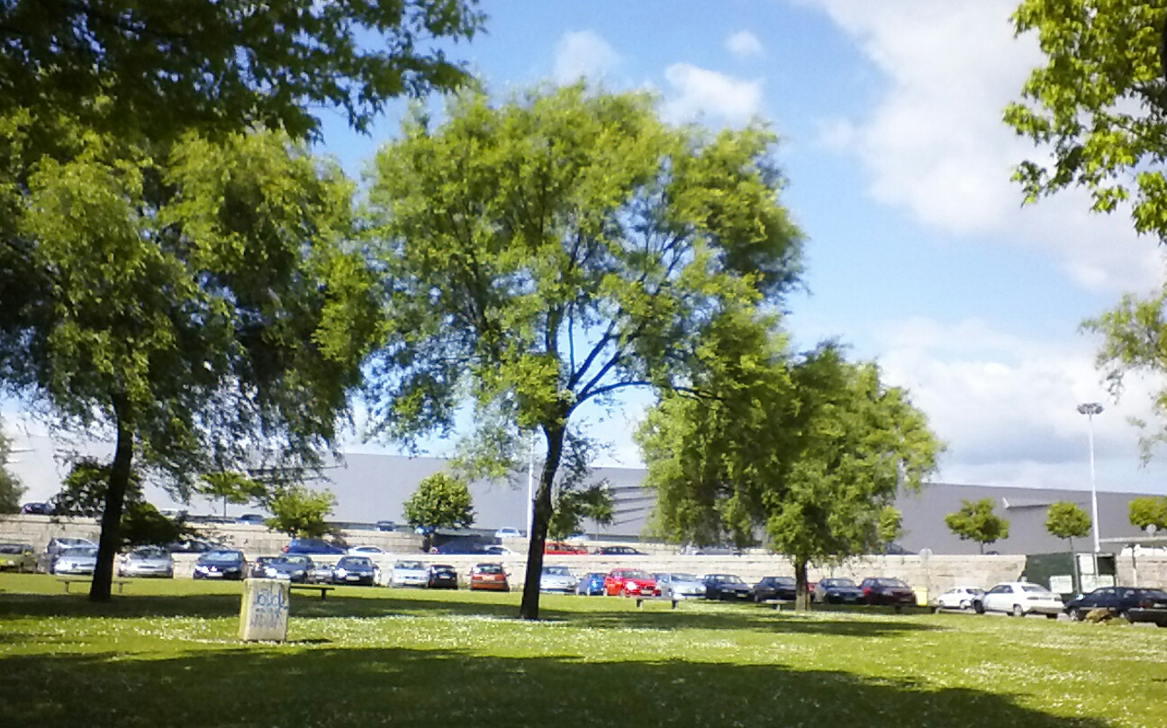 Parque Rosalía de Castro y Recinto Ferial al fondo en Pontevedra capital